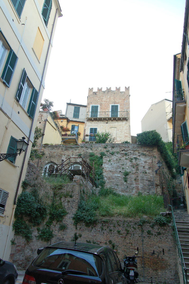 Chieti City 2011